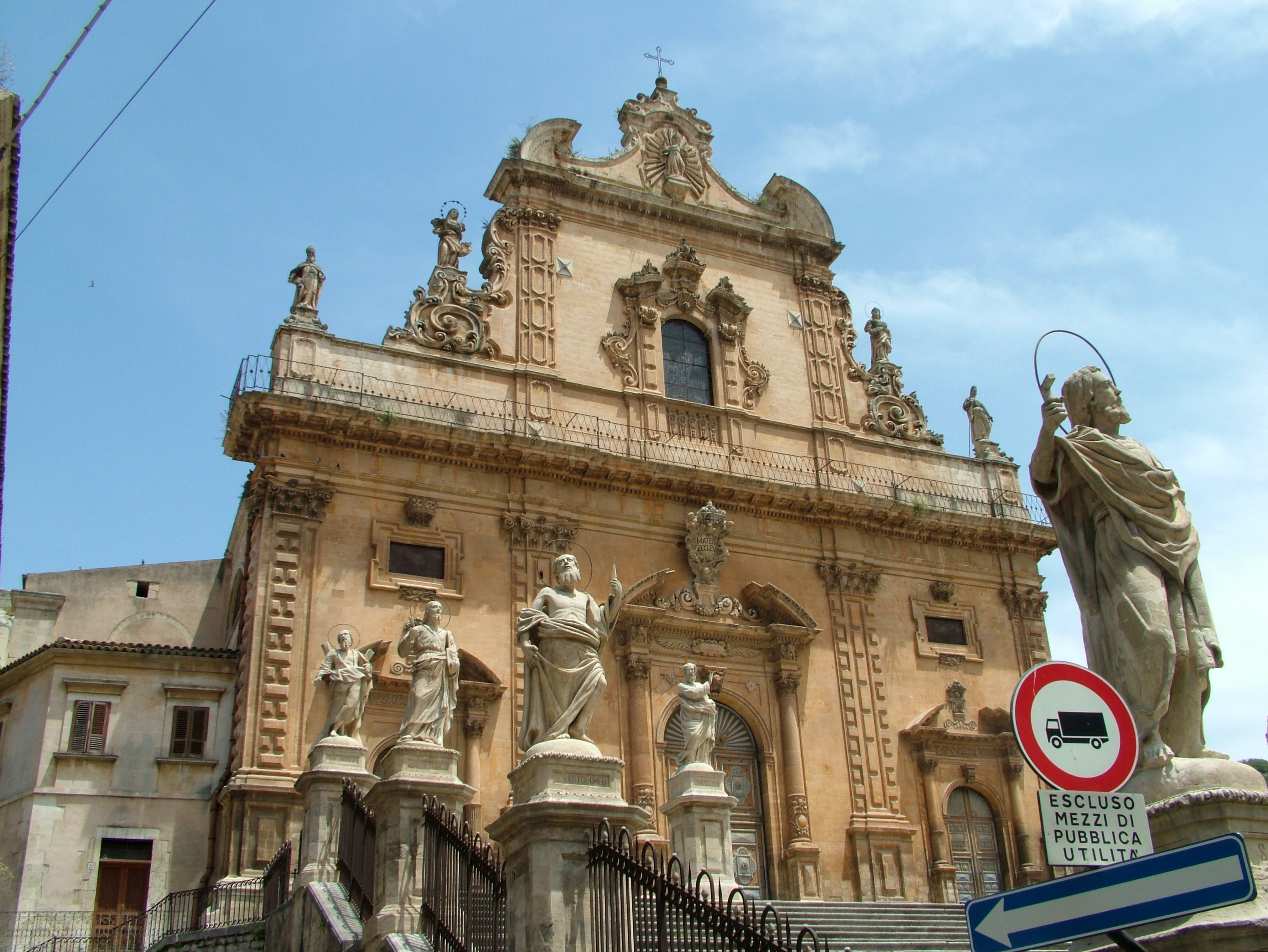 Modica, Sizilien, Chiesa San Pietro.